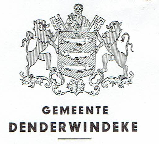 Origineel wapenschild zoals vermeld op briefwisseling.